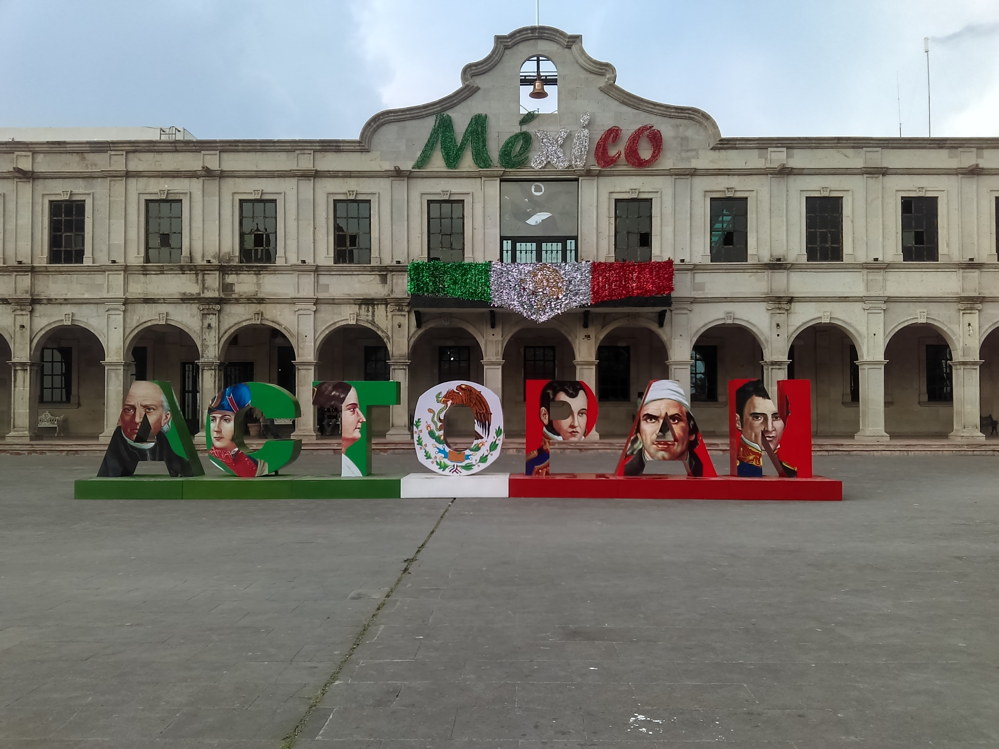 Palacio Municipal de Actopan, Hidalgo, México. Adornado para las fiestas patrias.